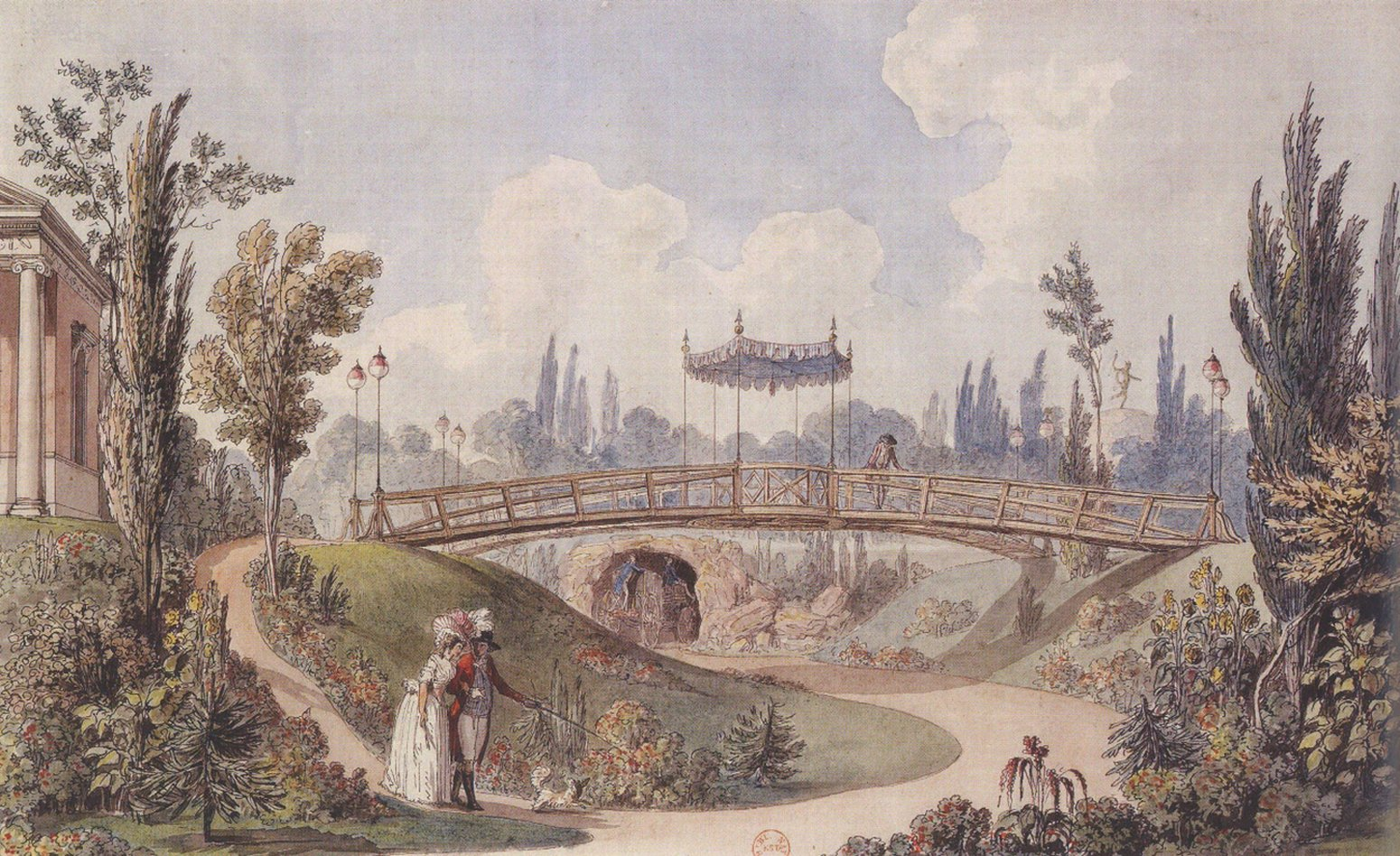 François-Joseph Bélanger (1744–1818): Garten von Pierre-Augustin Caron de Beaumarchais (1732–1799). Beaumarchais baute 1788 ein prächtiges dreistöckiges Haus mit einem ummauerten, von Bélanger gestalteten Park. Das Anwesen erstreckte sich vom Boulevard Saint-Antoine bis zur parallel verlaufenden rue Amelot. Von hier aus konnte Beaumarchais 1789 den Sturm auf die Bastille beobachten. Auf seinen Wunsch hin wurde er im Garten begraben. Das Anwesen musste 1818 dem Canal Saint-Martin weichen. Bibliothèque nationale de France.